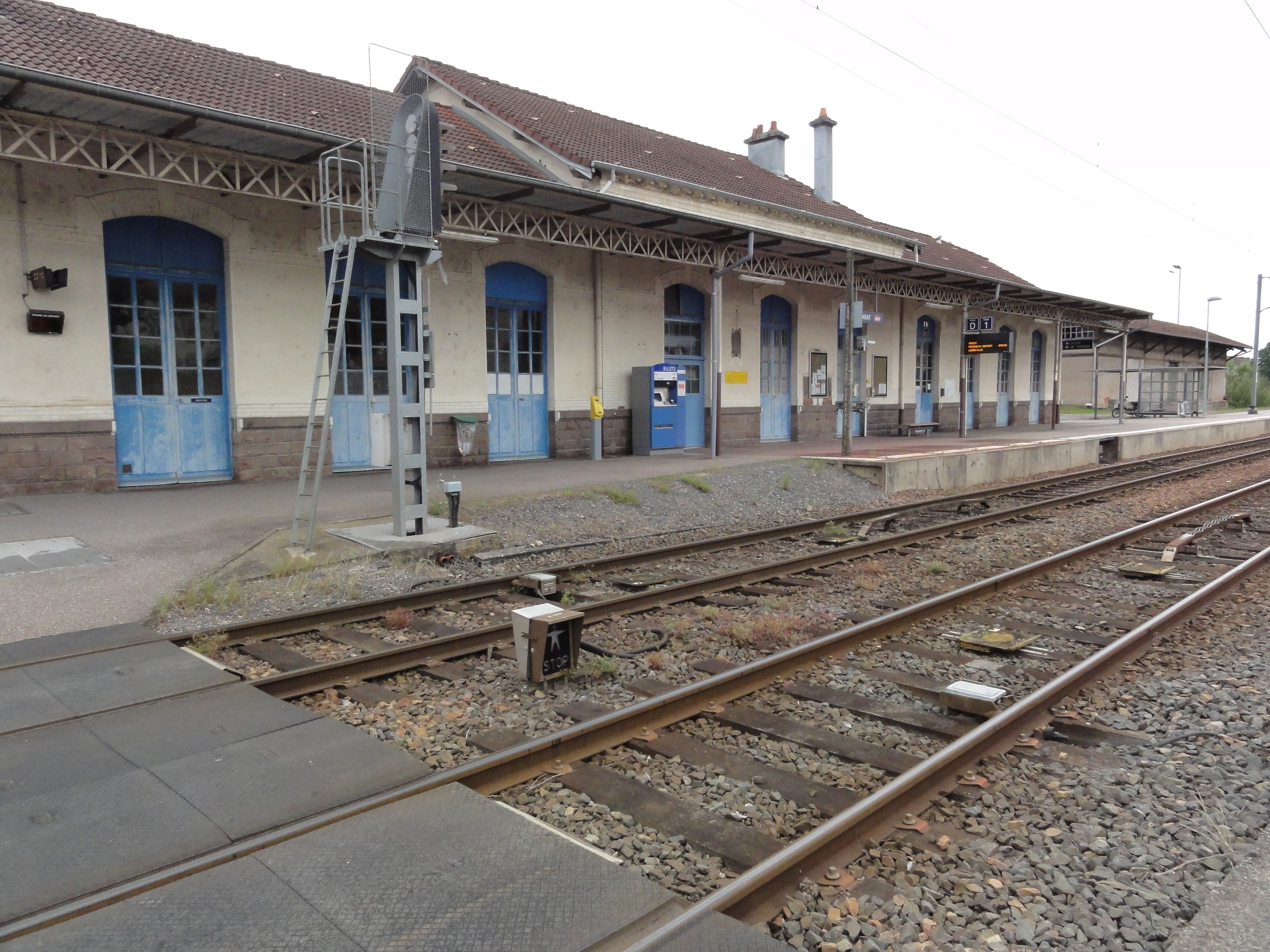 Baccarat (M-et-M) gare coté quais